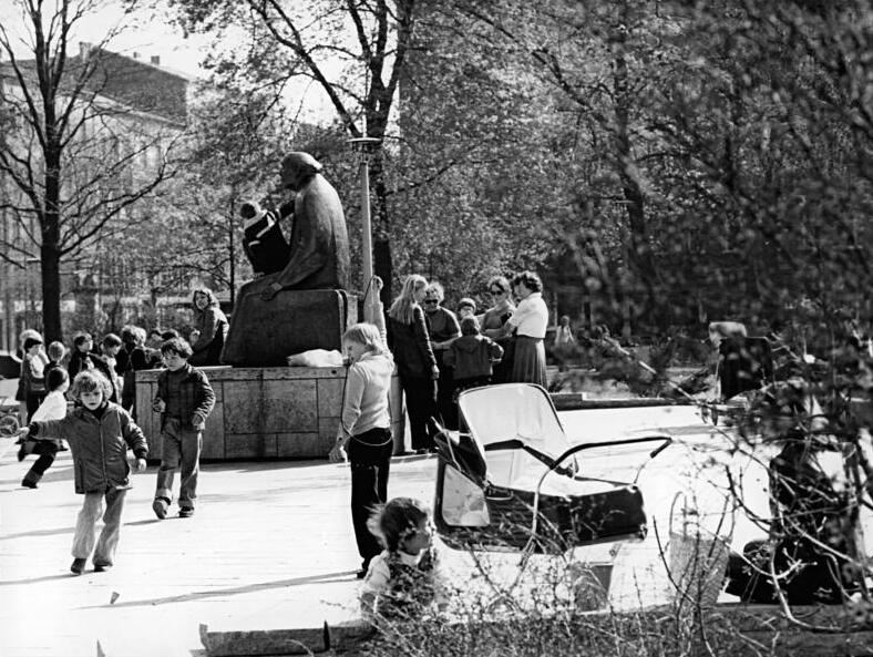 Berlin, Kollwitzplatz ADN-ZB Sturm 14.5.79 Berlin: Frühlich tummeln sich die Berliner Kinder vom Prenslauer Berg rund um das Käthe-Kollwitz-Denkmal am Kollwitz-Platz.